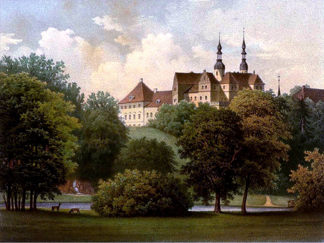 Schloss Zschepplin, Lithografie aus dem 19. Jahrhundert